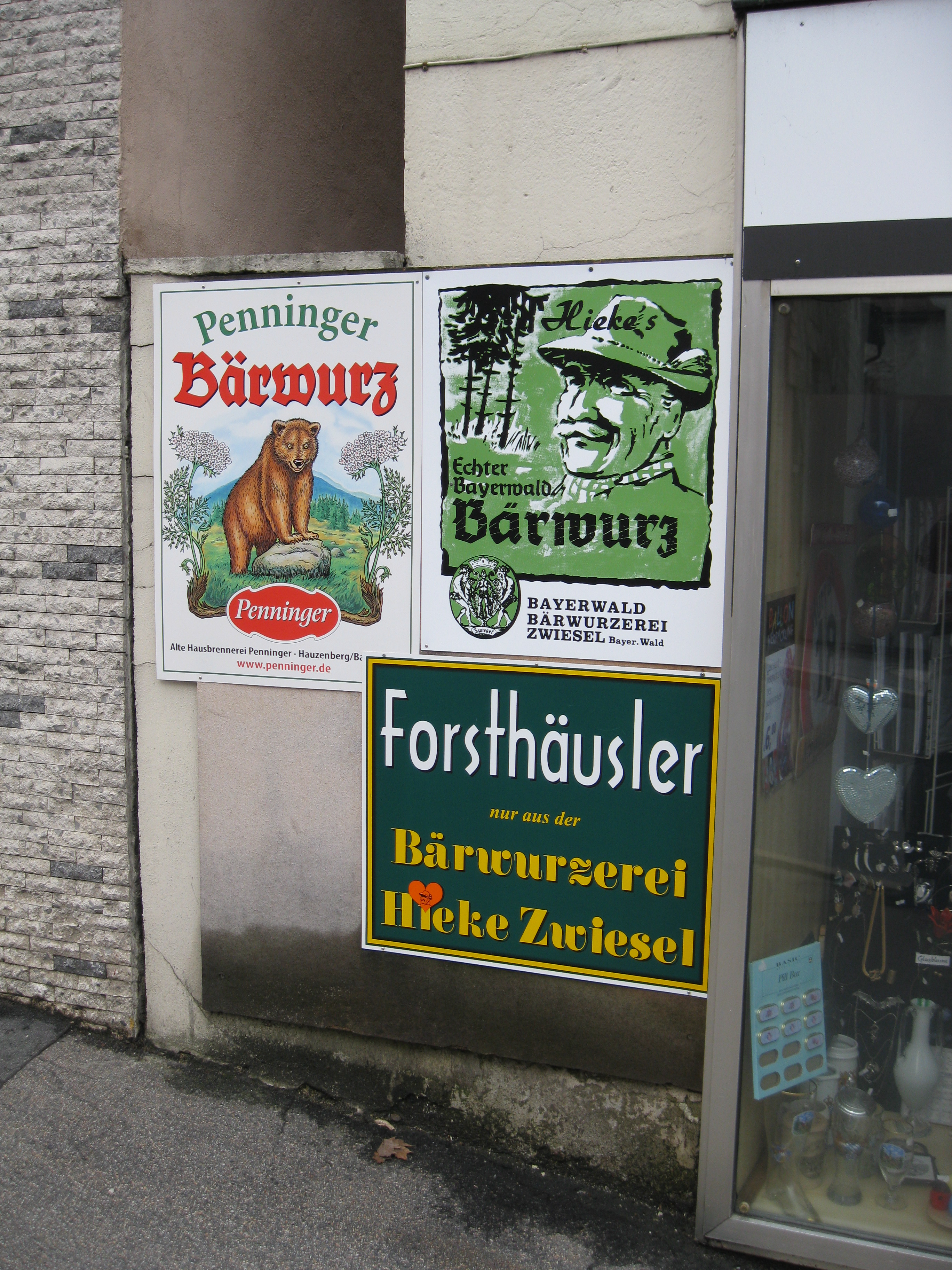 Bilder aus Grafenau